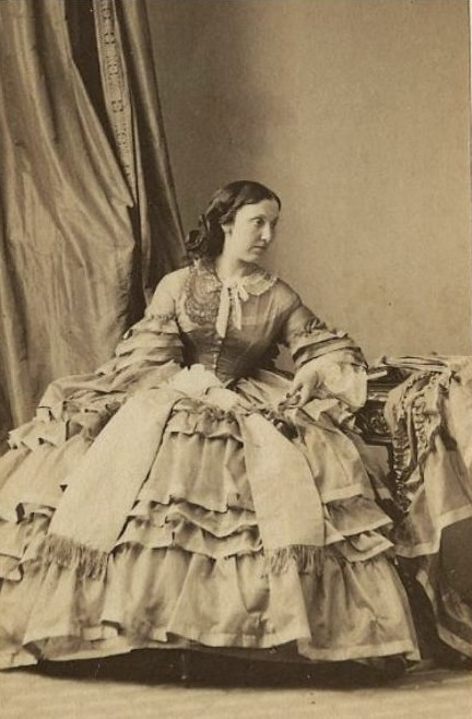 Барятинская Елизавета Александровна, ур. Чернышева (1826—1902)